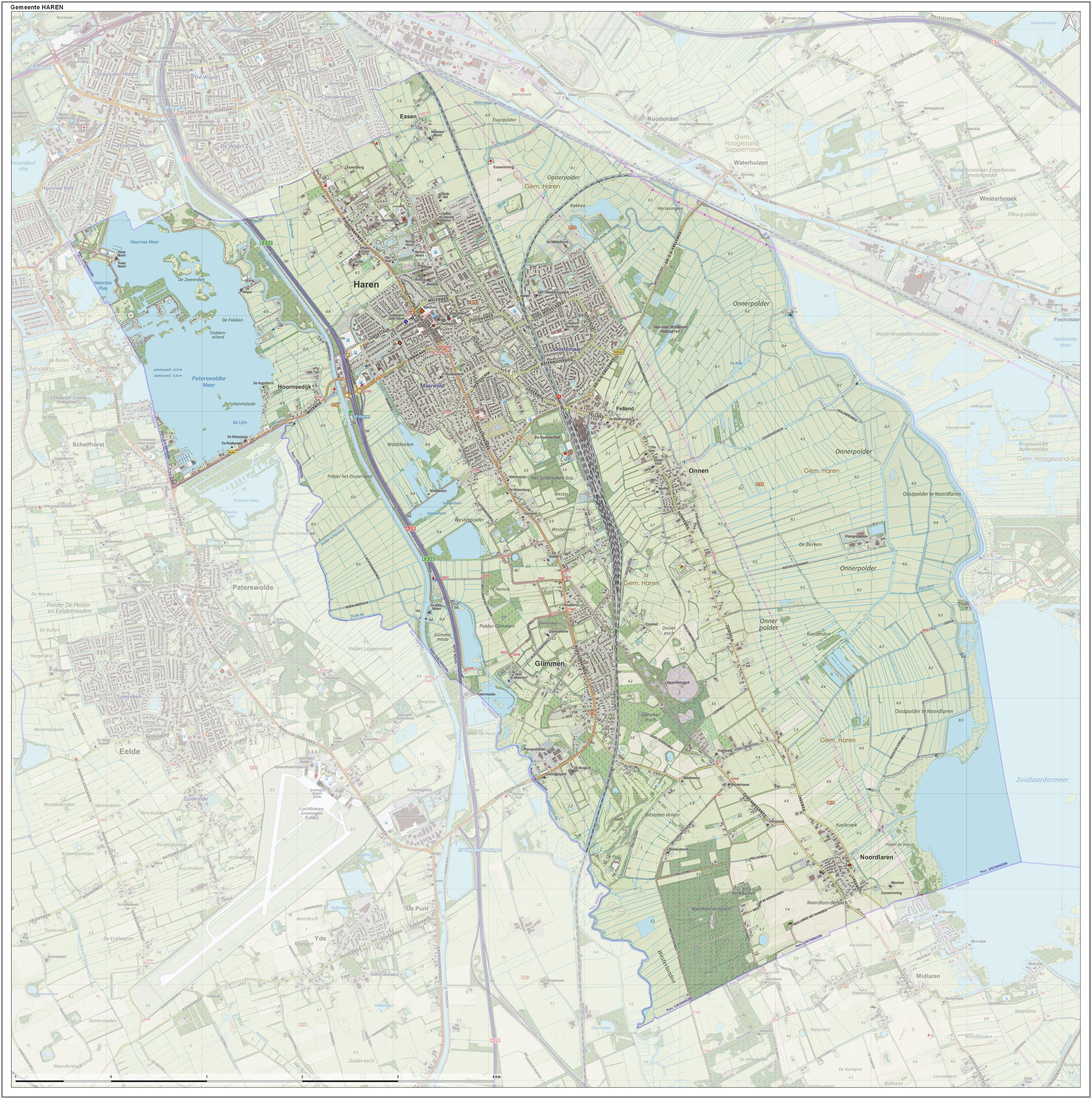 Topografische gemeentekaart. Resolutie: 400 pixels/km. Kaartbeeld samengesteld uit de open geodata van de Top10NL en Top25namen (Kadaster), Creative Commons-BY licentie. Gebouwvlakken uit open geodata BAG extract. Wegen uit de OpenStreetMap, OpenStreetMap community. Reliëfschaduw uit de Actuele Hoogtekaart AHN2. Samenstelling en kleurenschema: Jan-Willem van Aalst, met QGIS. Zie ook de Legenda.